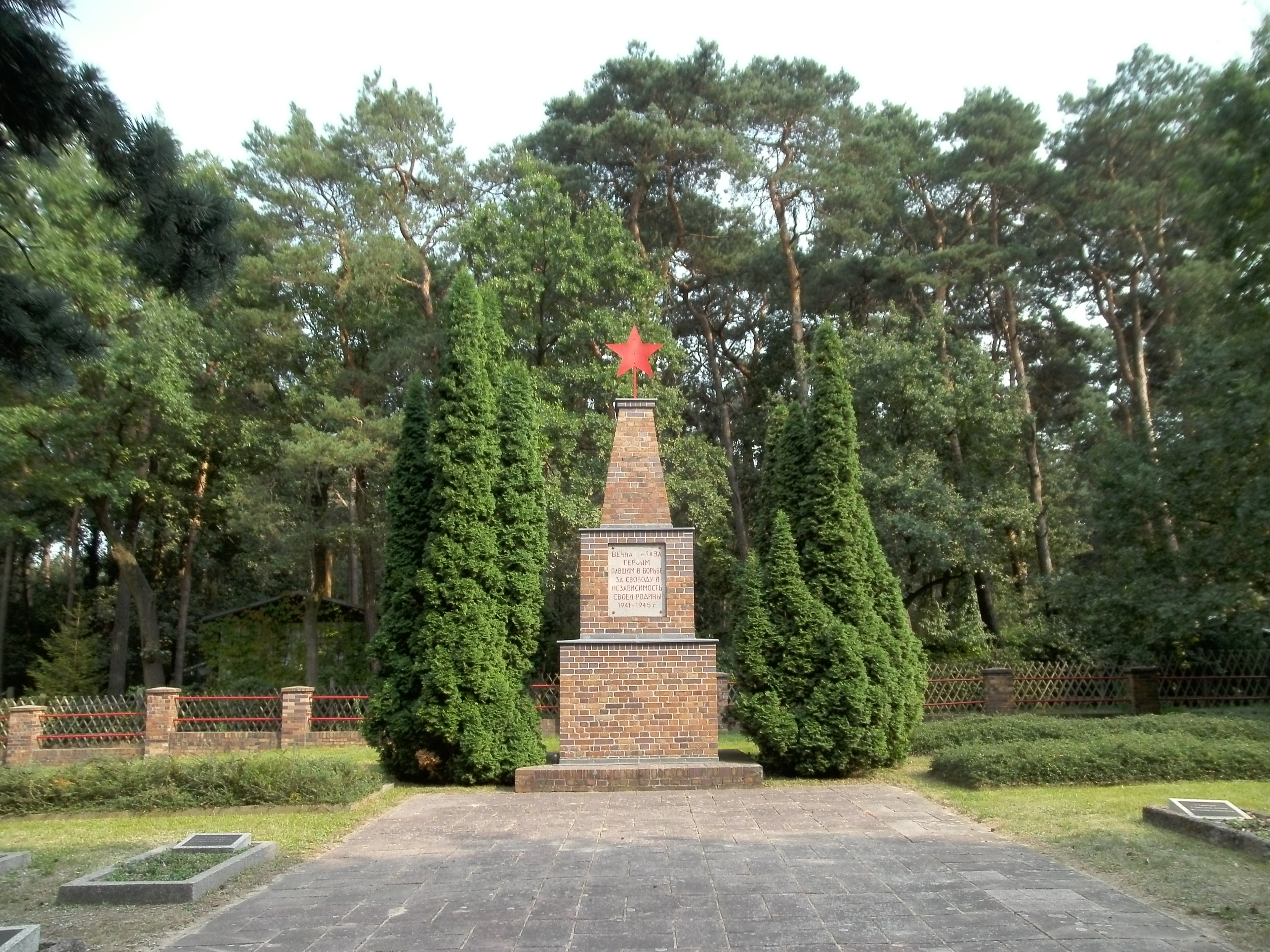 Russisches Soldatenehrenmal